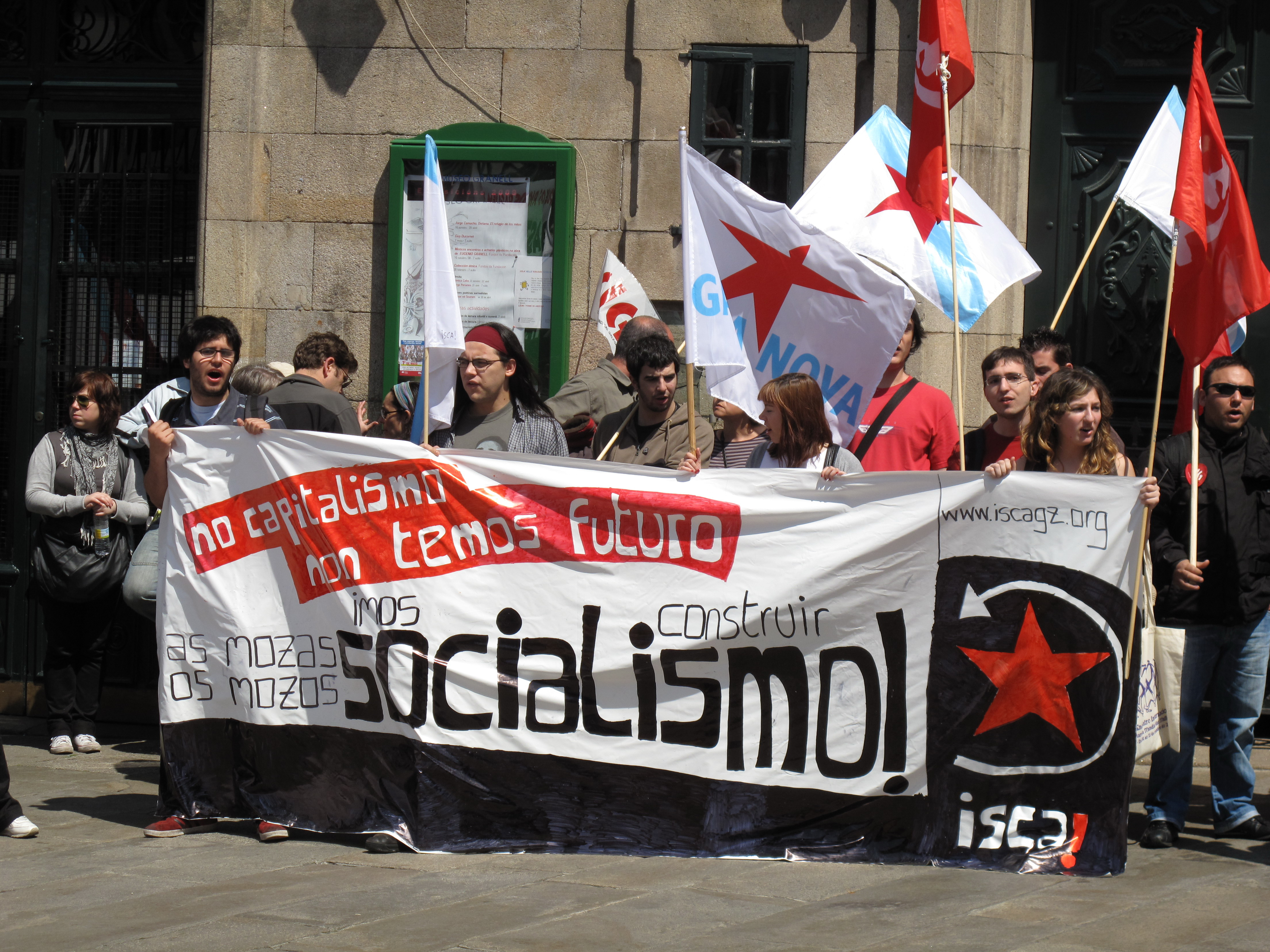 Día Internacional dos Traballadores en Santiago de Compostela. 2009